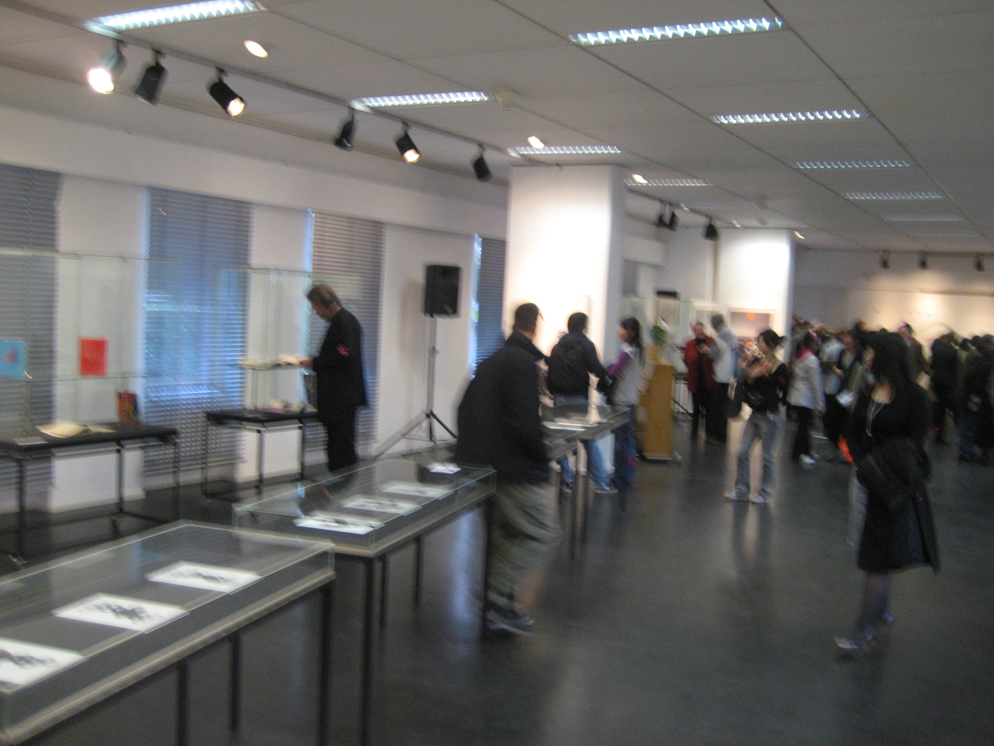 Ahn-Sang Soo Exhibition in the Klingspor-Museum, Offenbach